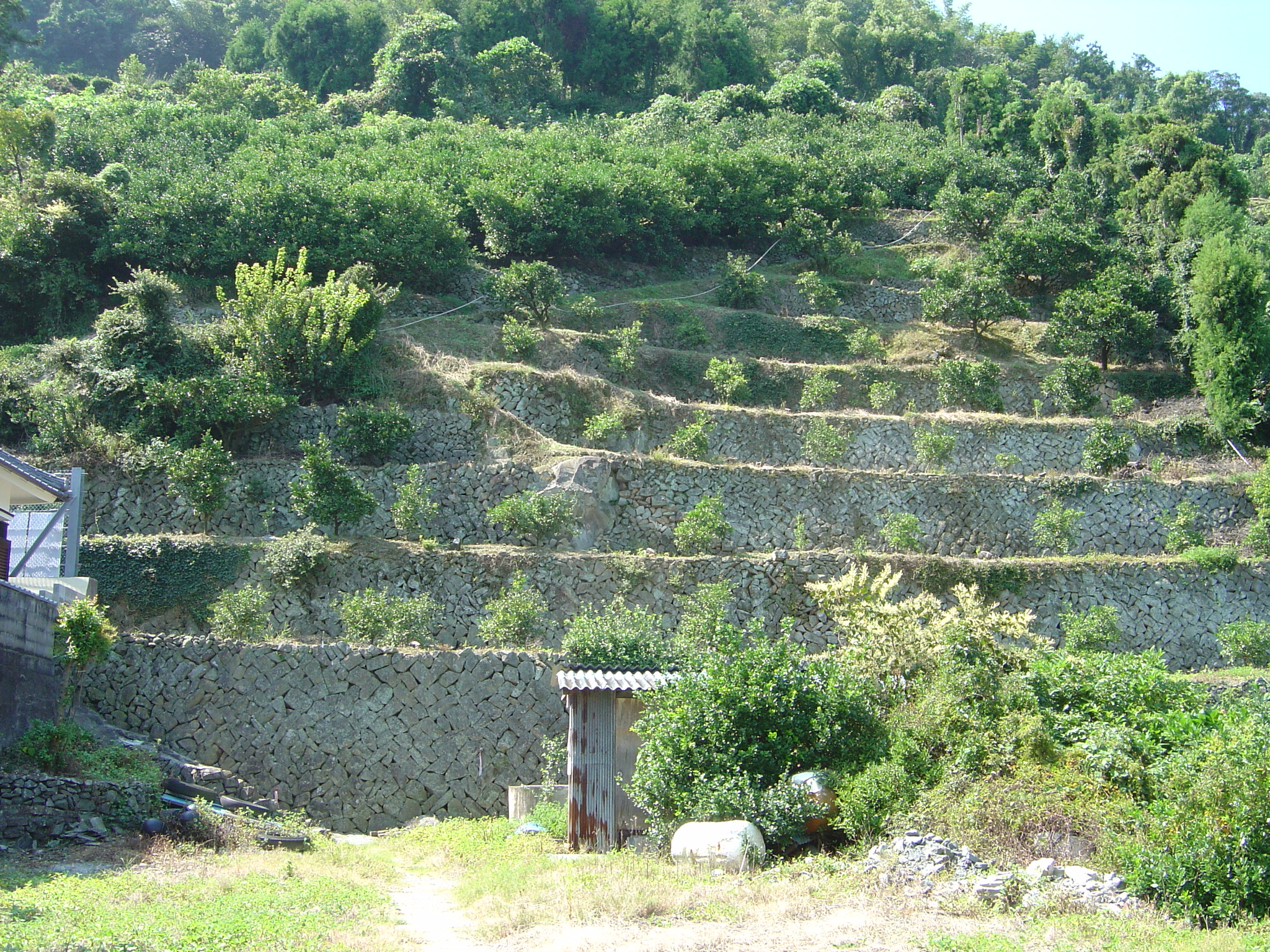 dandanbatake.uwajima